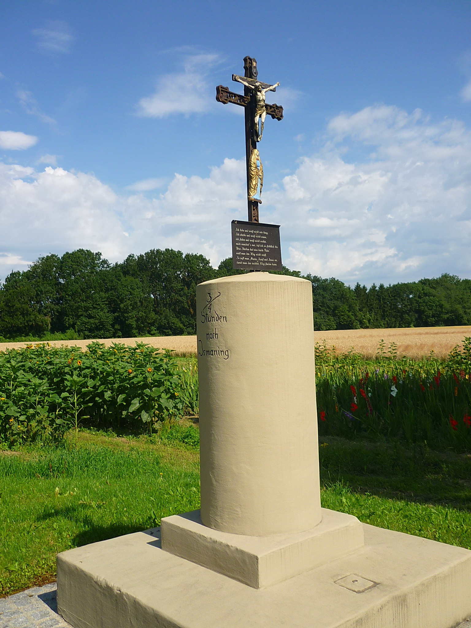 Ismaning, Pestsäule, Münchenerstrasse